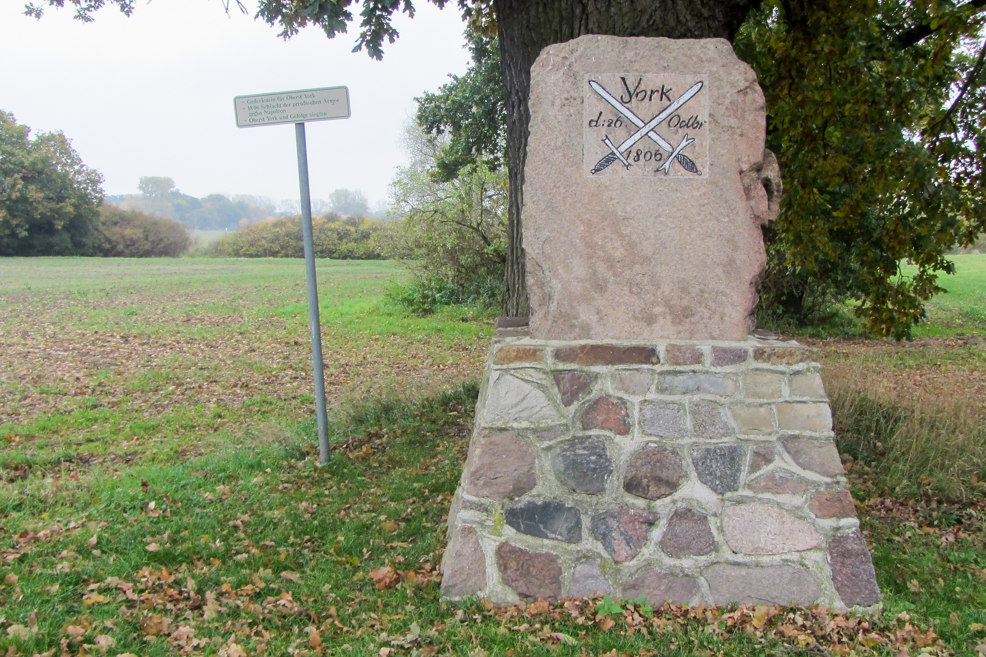 Yorck-Stein, an der K 1466; Abschnitt 008, km 0,2 in Hohenberg-Krusemark OT Altenzaun